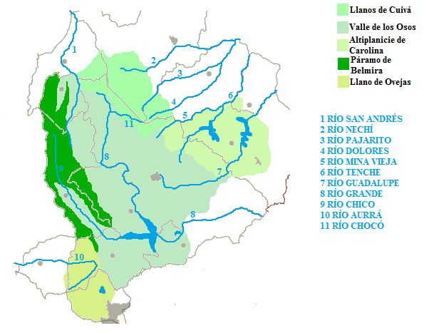 Hidrografía y delimitación natural de la meseta de Santa Rosa de Osos